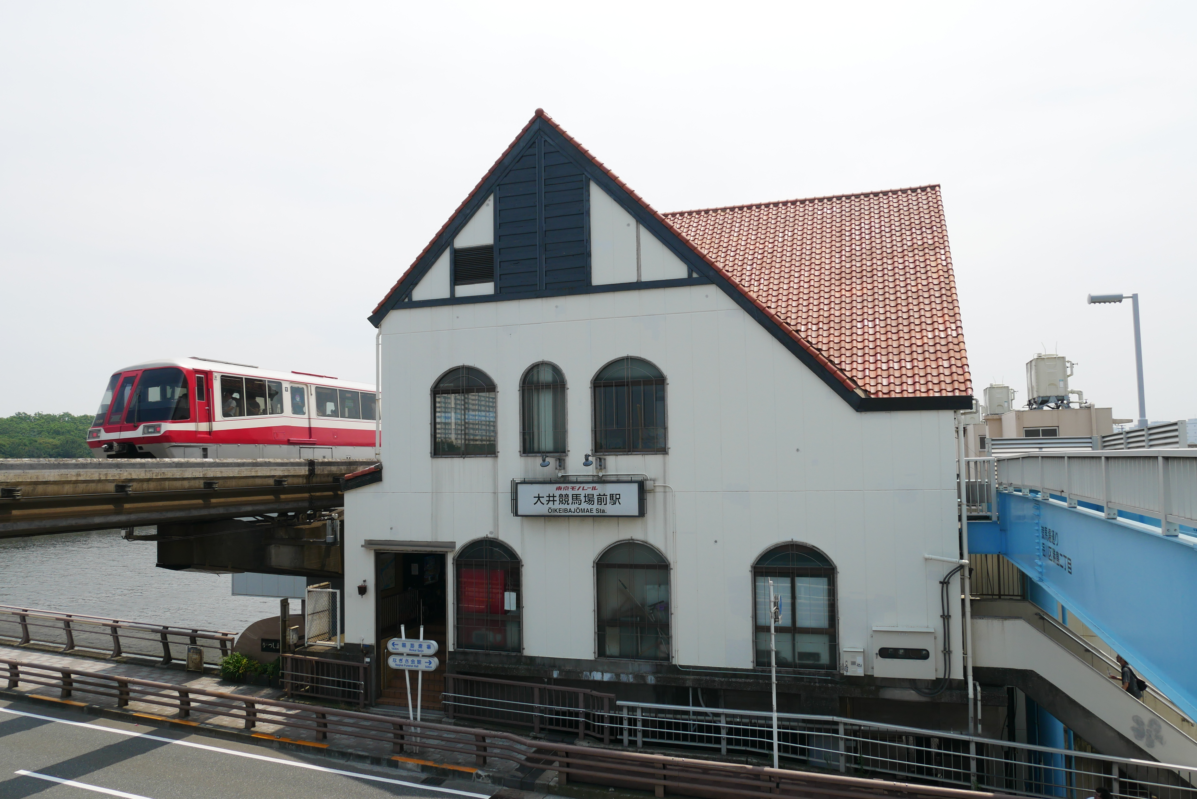 Ōi Keibajō-mae Station (大井競馬場前駅)